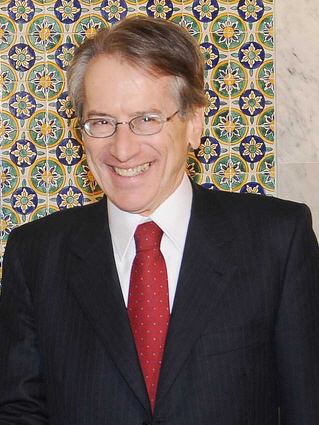 Le ministre tunisien des Affaires étrangères, Rafik Abdessalem, reçoit son homologue italien, Giulio Terzi Di Sant'Agata, le 6 janvier 2012